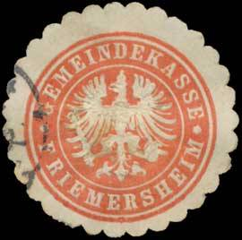 Sealing stamp Title: Gemeindekasse Friemersheim Description: Duisburg, rot, weiß, geprägt Place: Friemersheim size: 3 cm